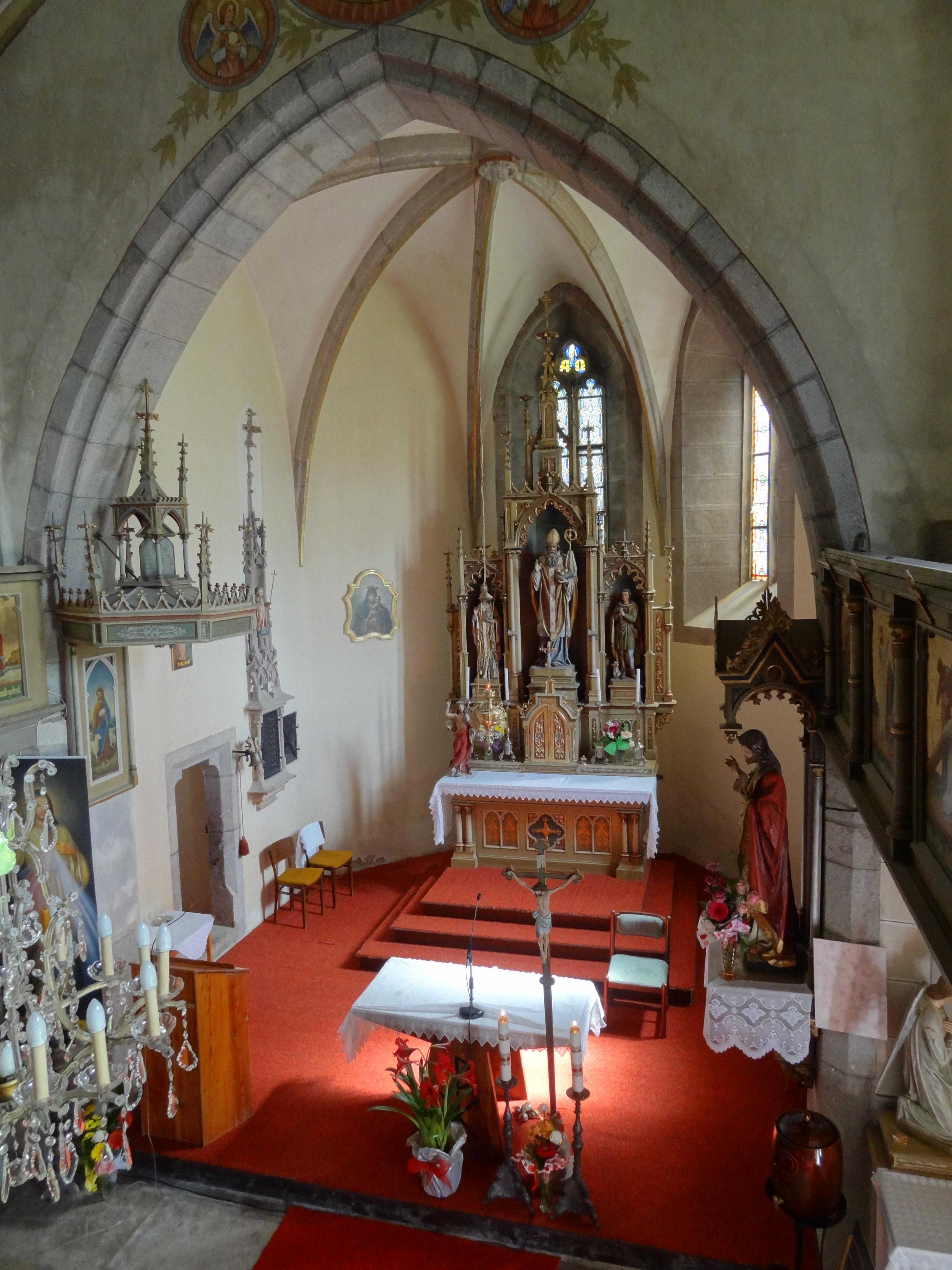 presbytérium